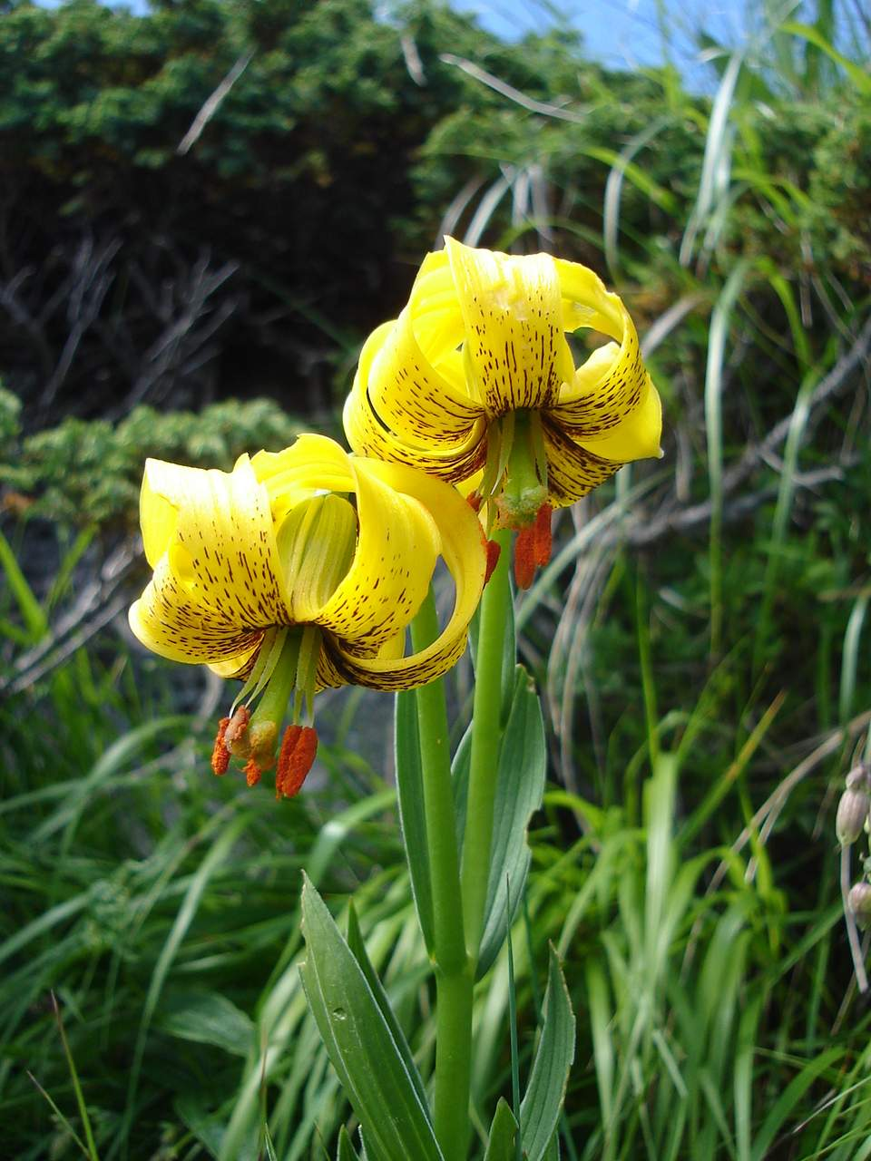 Vitosha mountain, Bulgaria (Lilium jankae)